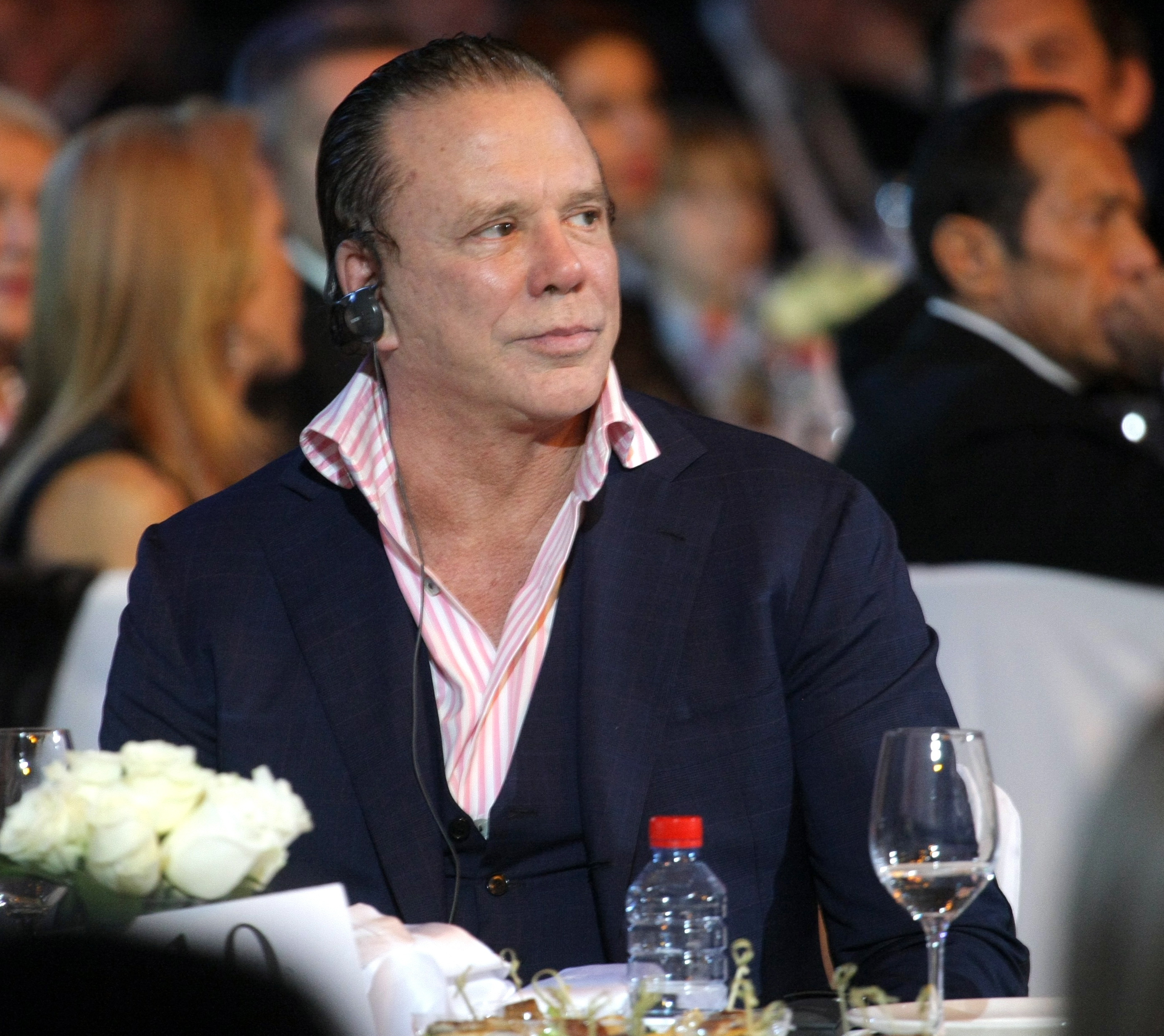 Американский киноактер Микки Рурк на благотворительном концерте в поддержку деятельности России по борьбе с детскими онкологическими и офтальмологическими заболеваниями